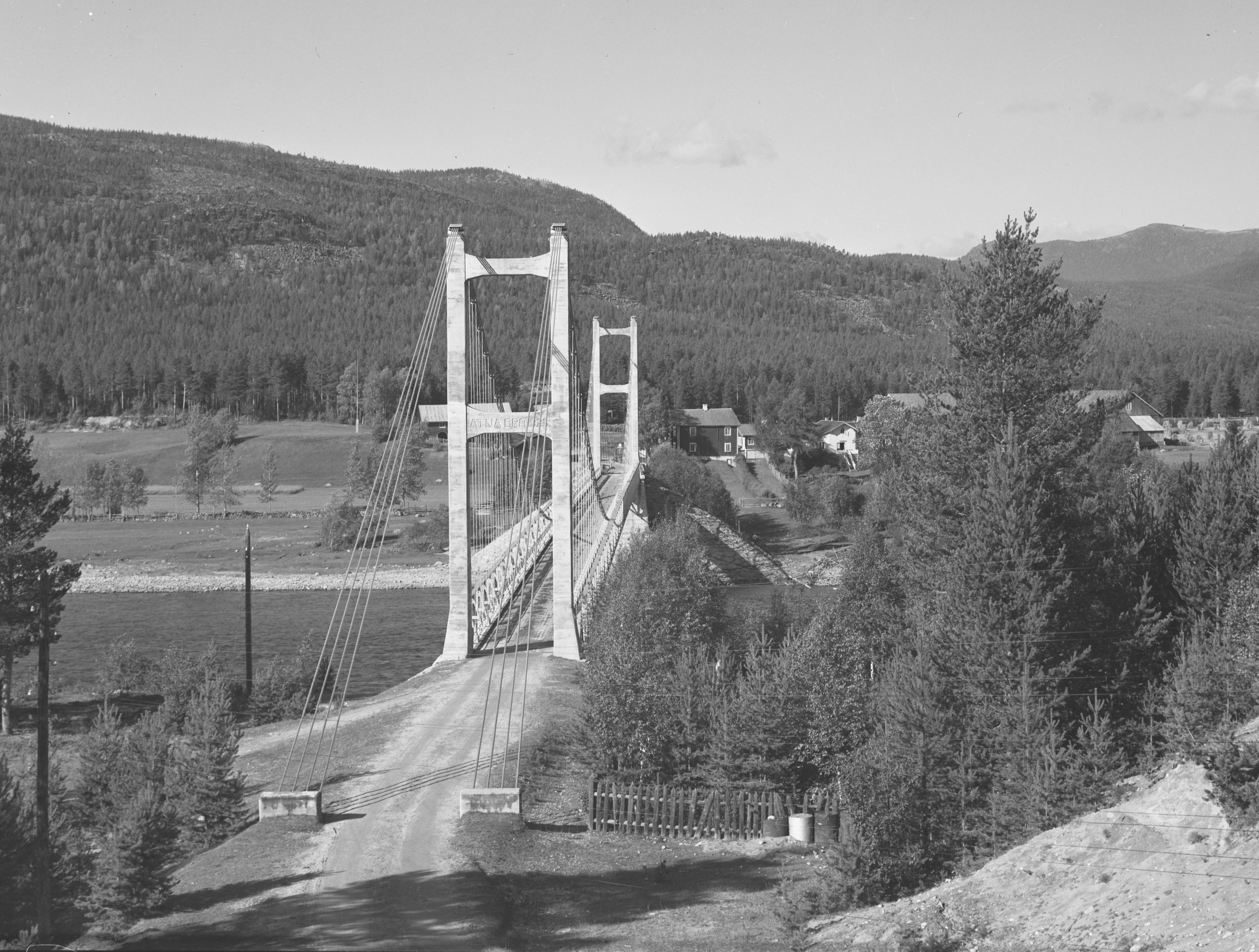 Bildet er hentet fra Nasjonalbibliotekets bildesamling. Anmerkninger til bildet var: Fotograf ukjent. Atna,Glomma,Østerdalen, Stor-Elvdal, Hedmark